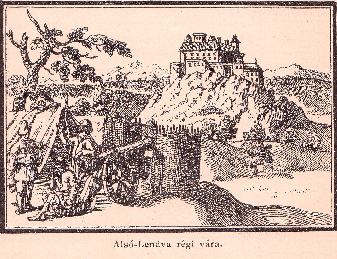 Alsó-Lendva régi vára.